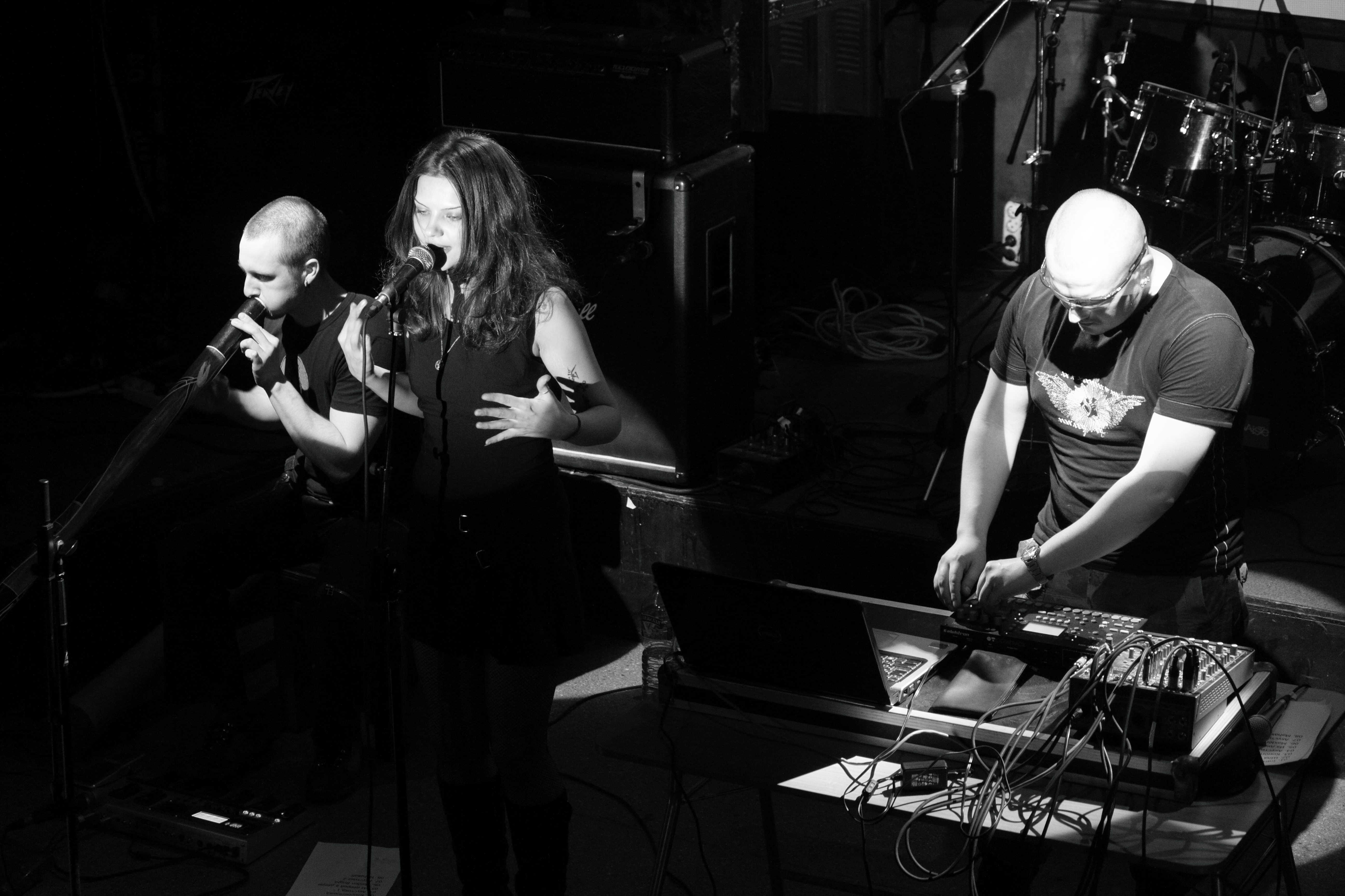 Hidden Tribe - Выступление на фестивале «СОЛЬ» в клубе «ХЛЕБ», Москва.